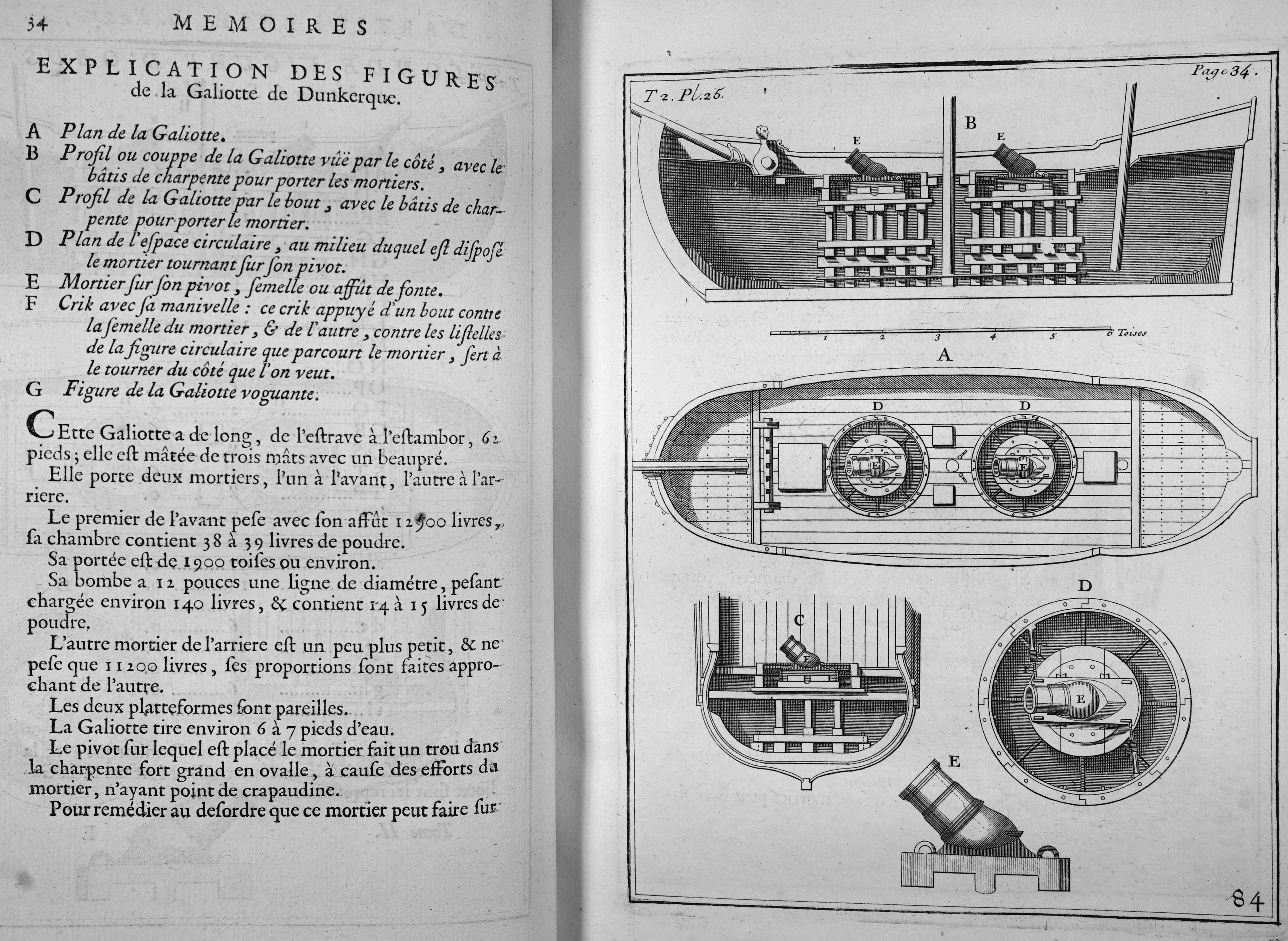 Mémoires d'artillerie, recueillis par M. Surirey de Saint Remy, tome II, exemplaire de la B.M. de Reims, troisième édition.